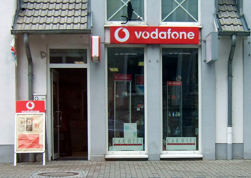 Vodafone Geschäft bei Mainz